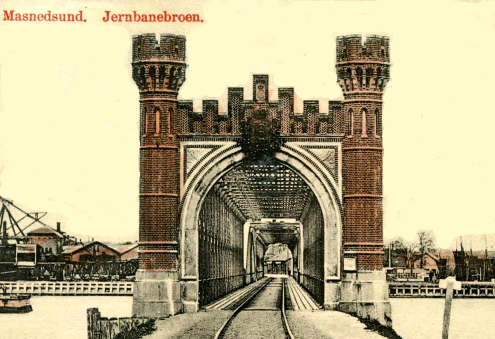 Den gamle bro over Masnedsund med portaler af N.P.C. Holsøe